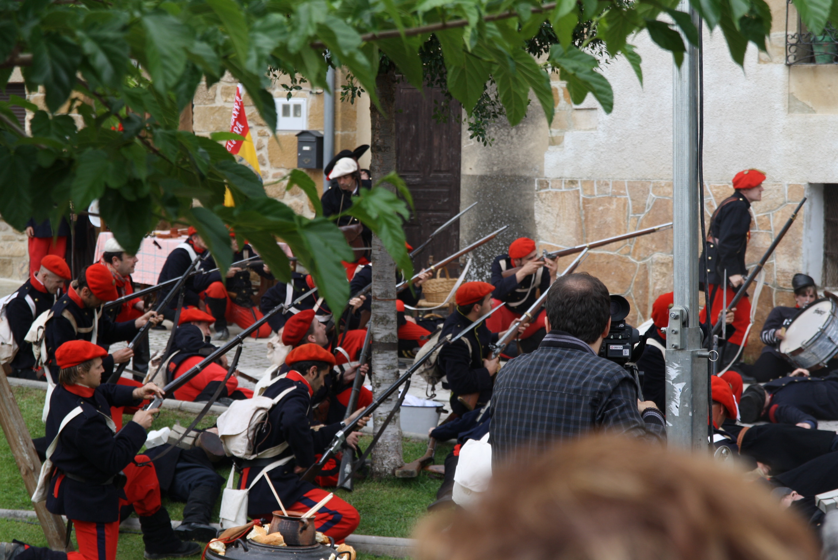 Teatralización "La Batalla de Lácar" Antzezpena